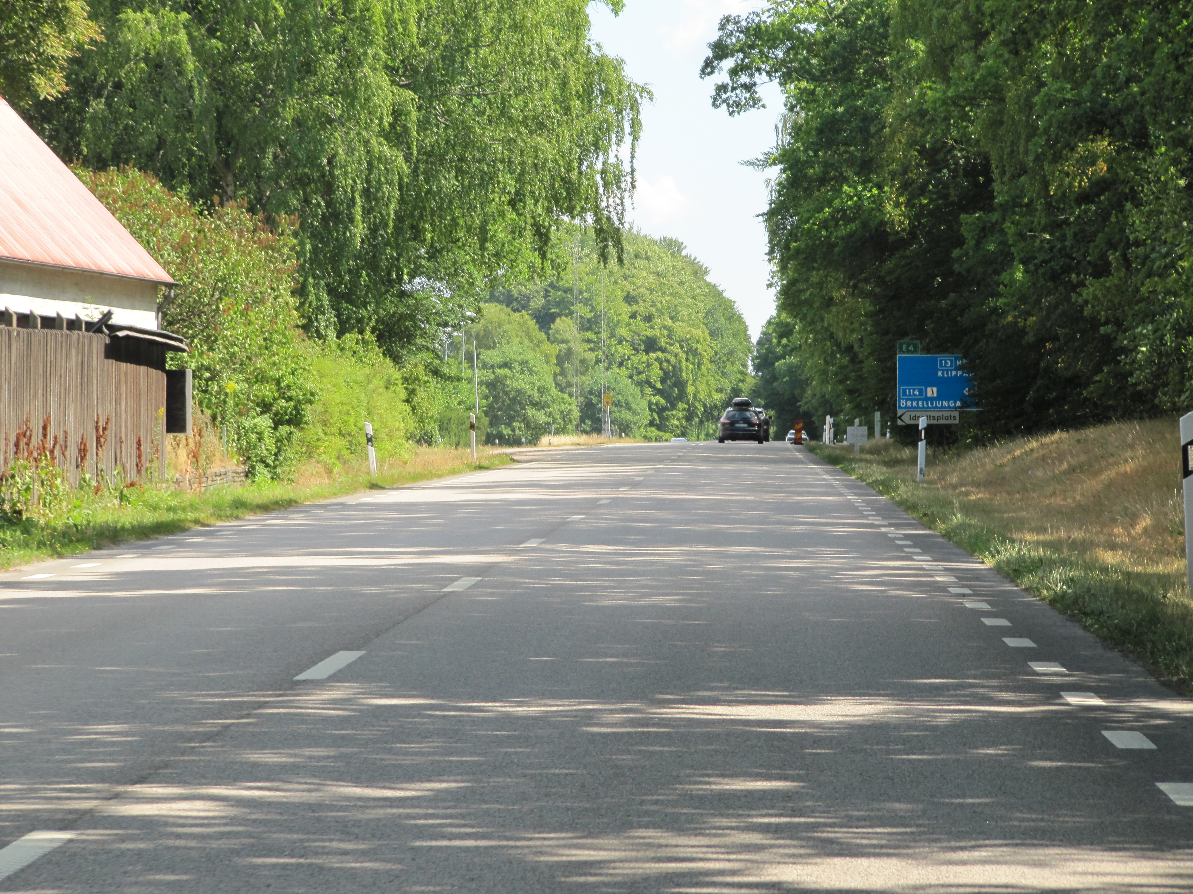 Riksväg 13 vid Munka-Ljungby. Längre fram till vänster börjar länsväg 114 till Örkelljunga.